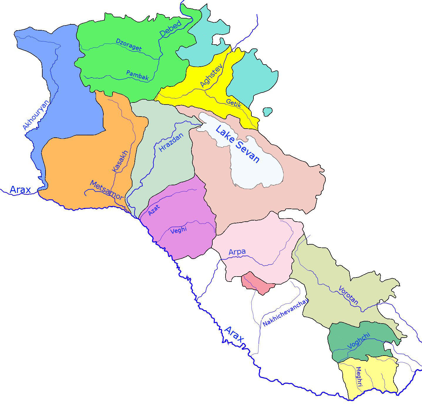 Map of the Rivers of Armenia — in Western Asia. Exclaves deleted according to official map at